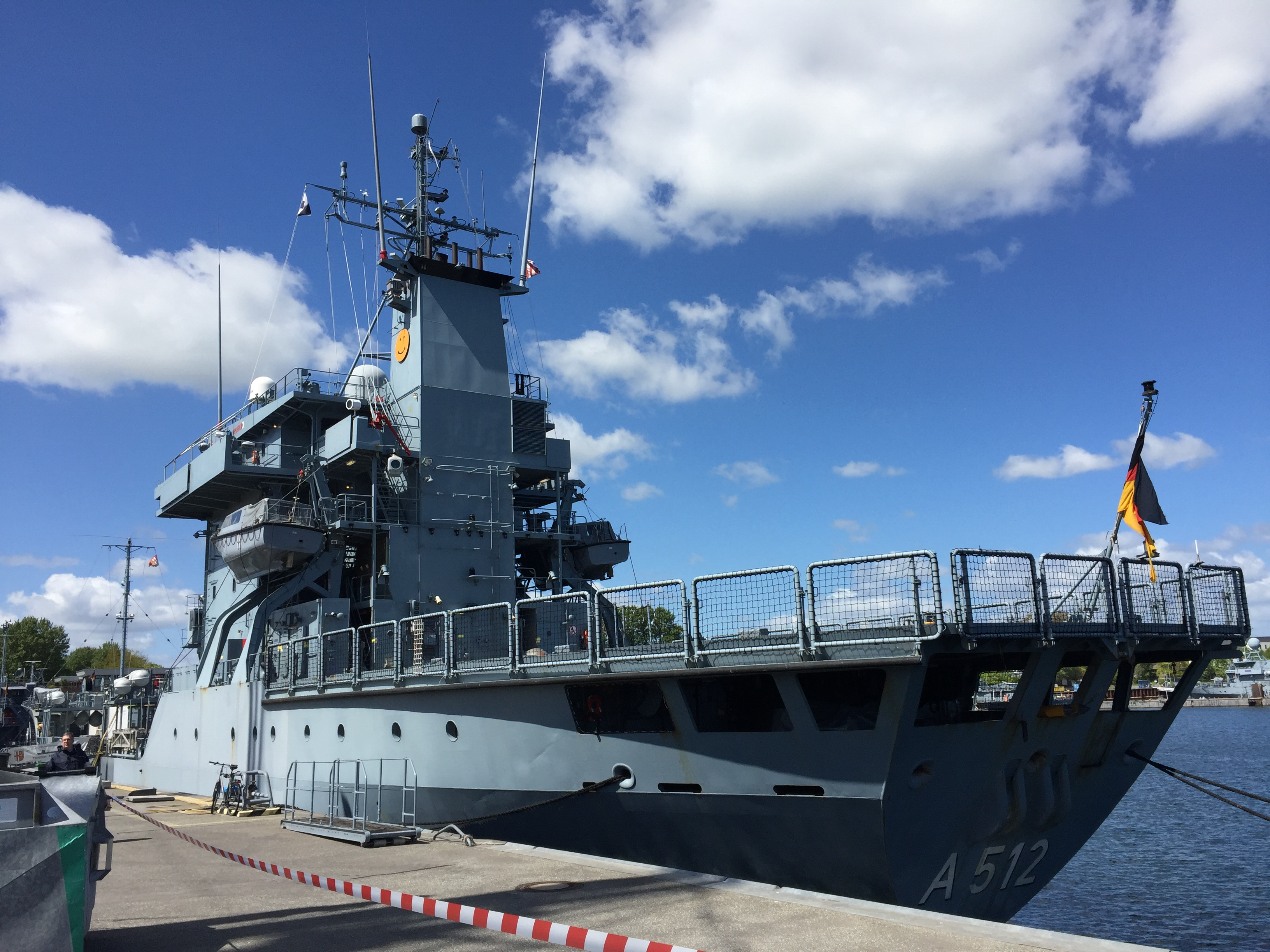 Tender 'Mosel' A512 Heckansicht - mit Smiley